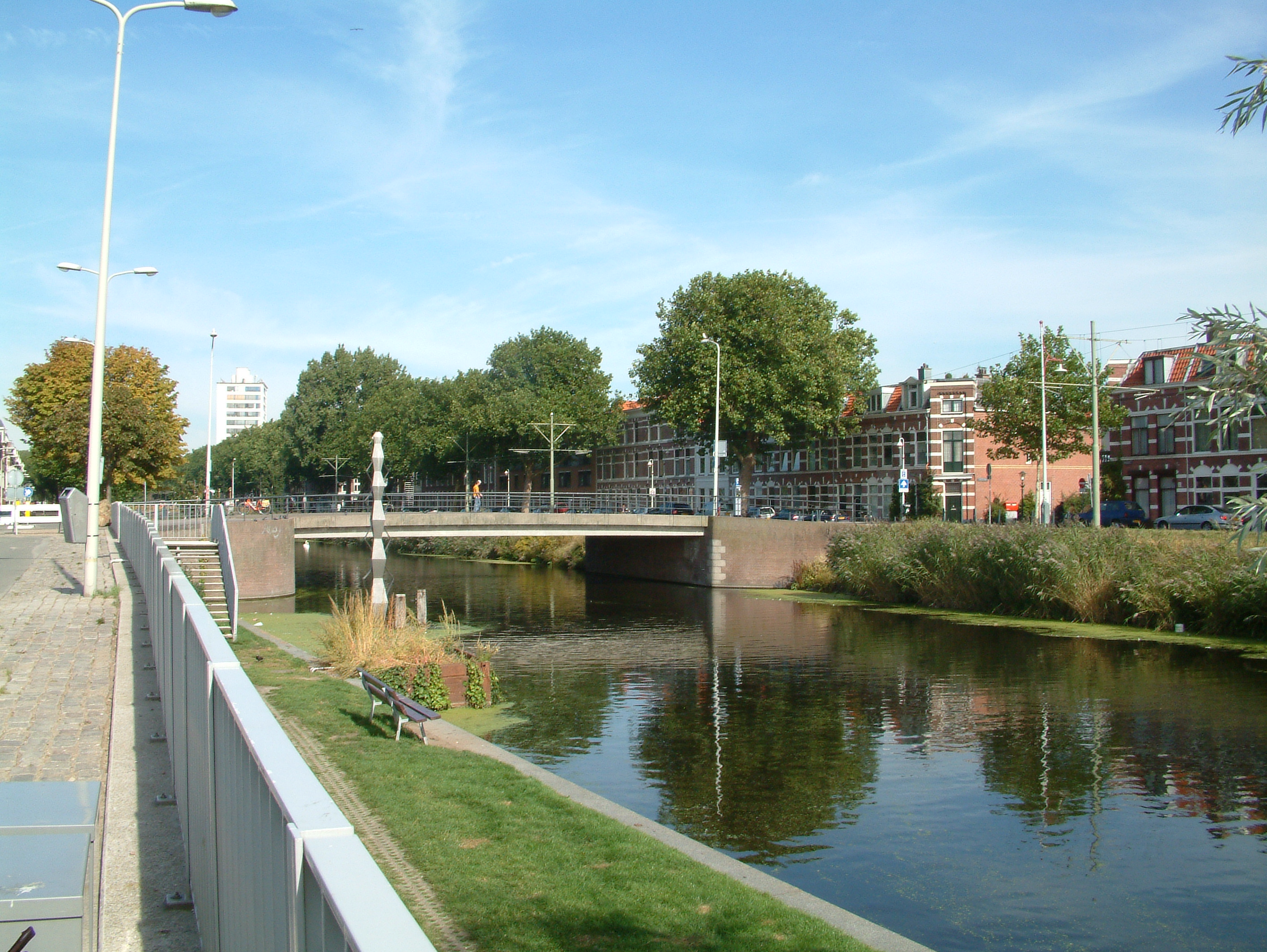 Brug in Den Haag